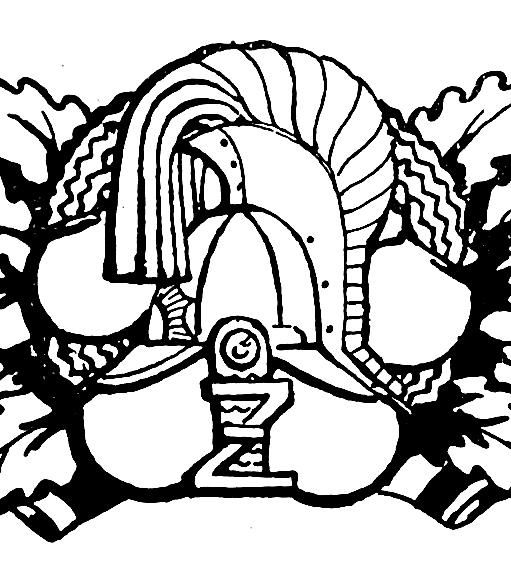 Odznaka żandarmerii (-1931)